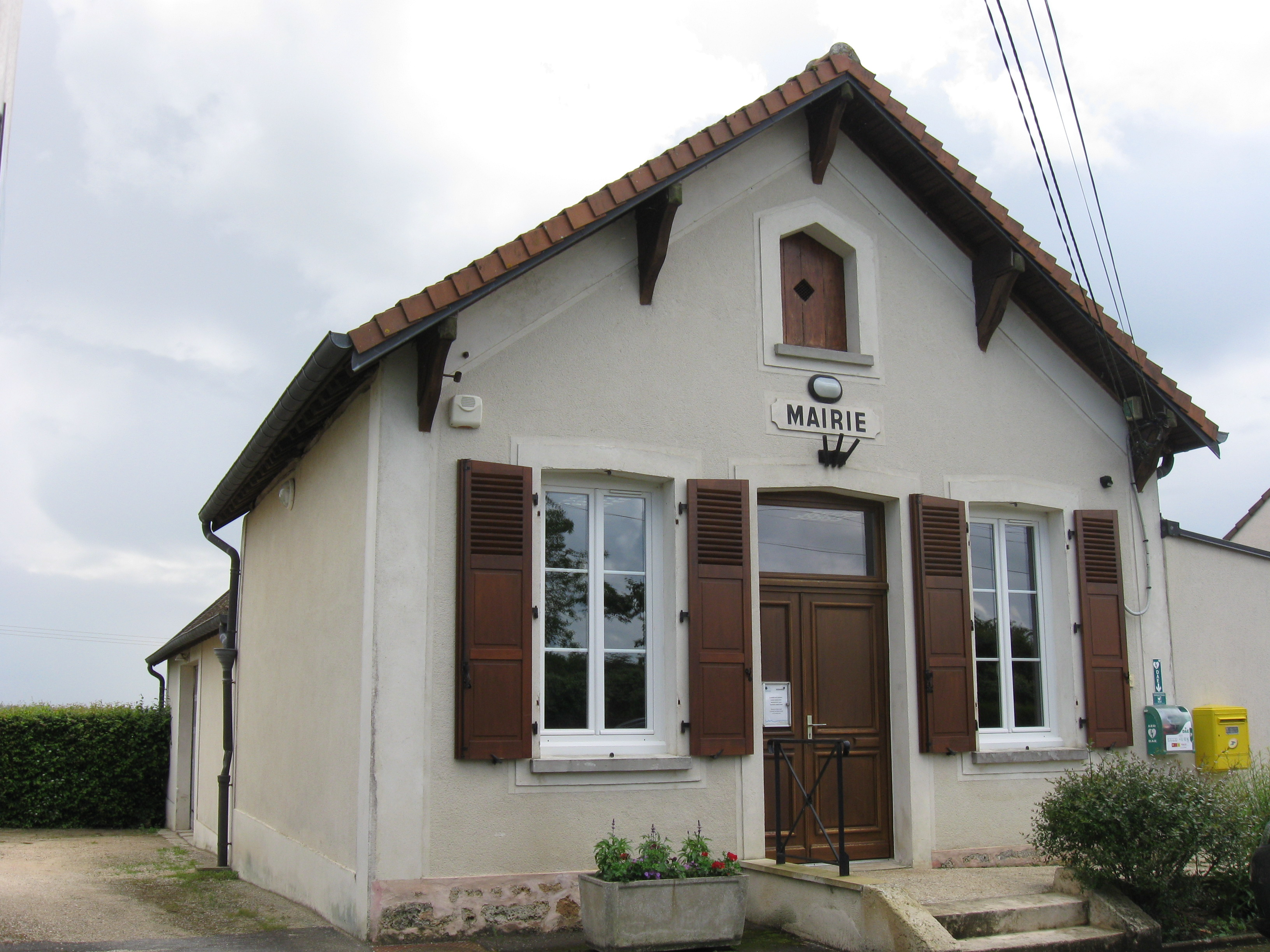 Mairie de Boisdon. (Seine-et-Marne, région Île-de-France).